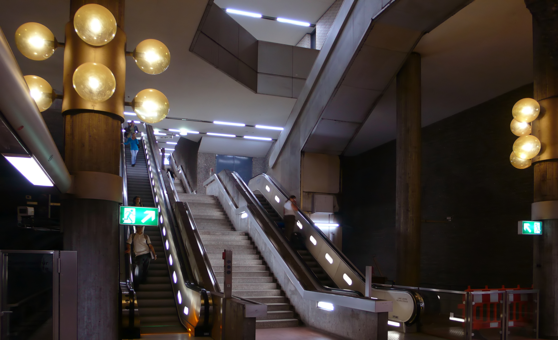 U-Bahnhof Rothenburger Straße der U-Bahn Nürnberg, Südaufgang, Blick von Norden